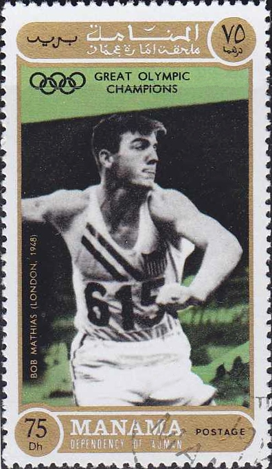 Bob Mathias